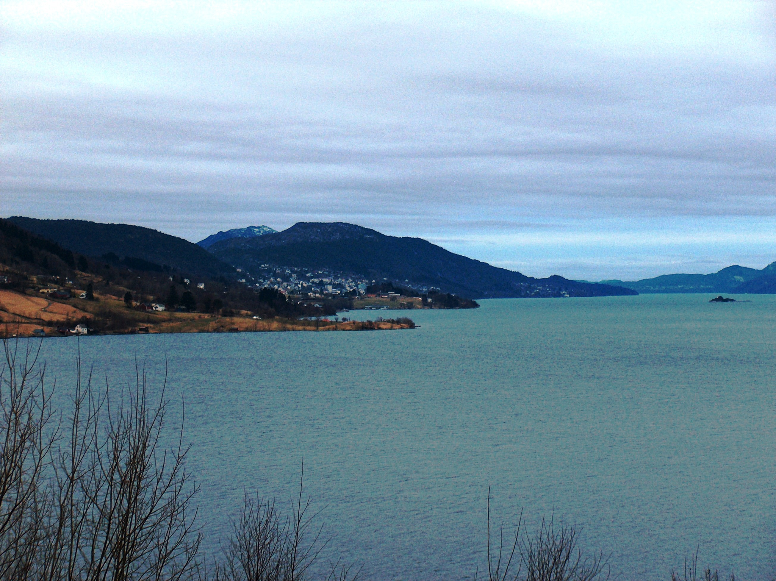 Sørfjorden mot Garnes og Ytre Arna, Bergen in Norway.